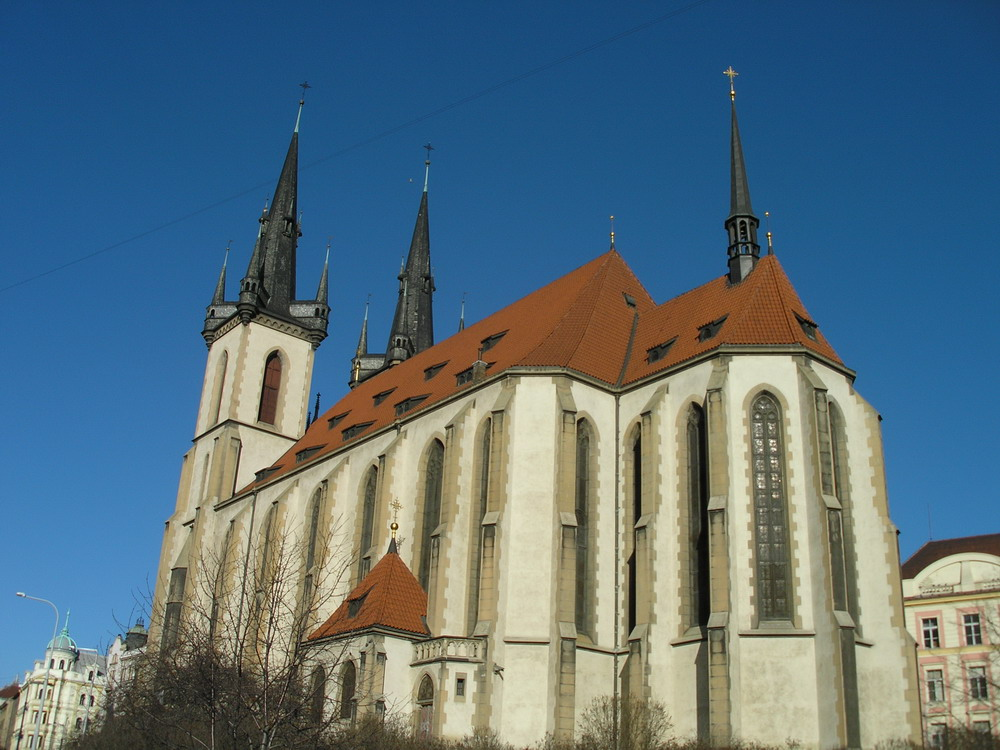 Kostel sv. Antonína v Praze-Holešovicích